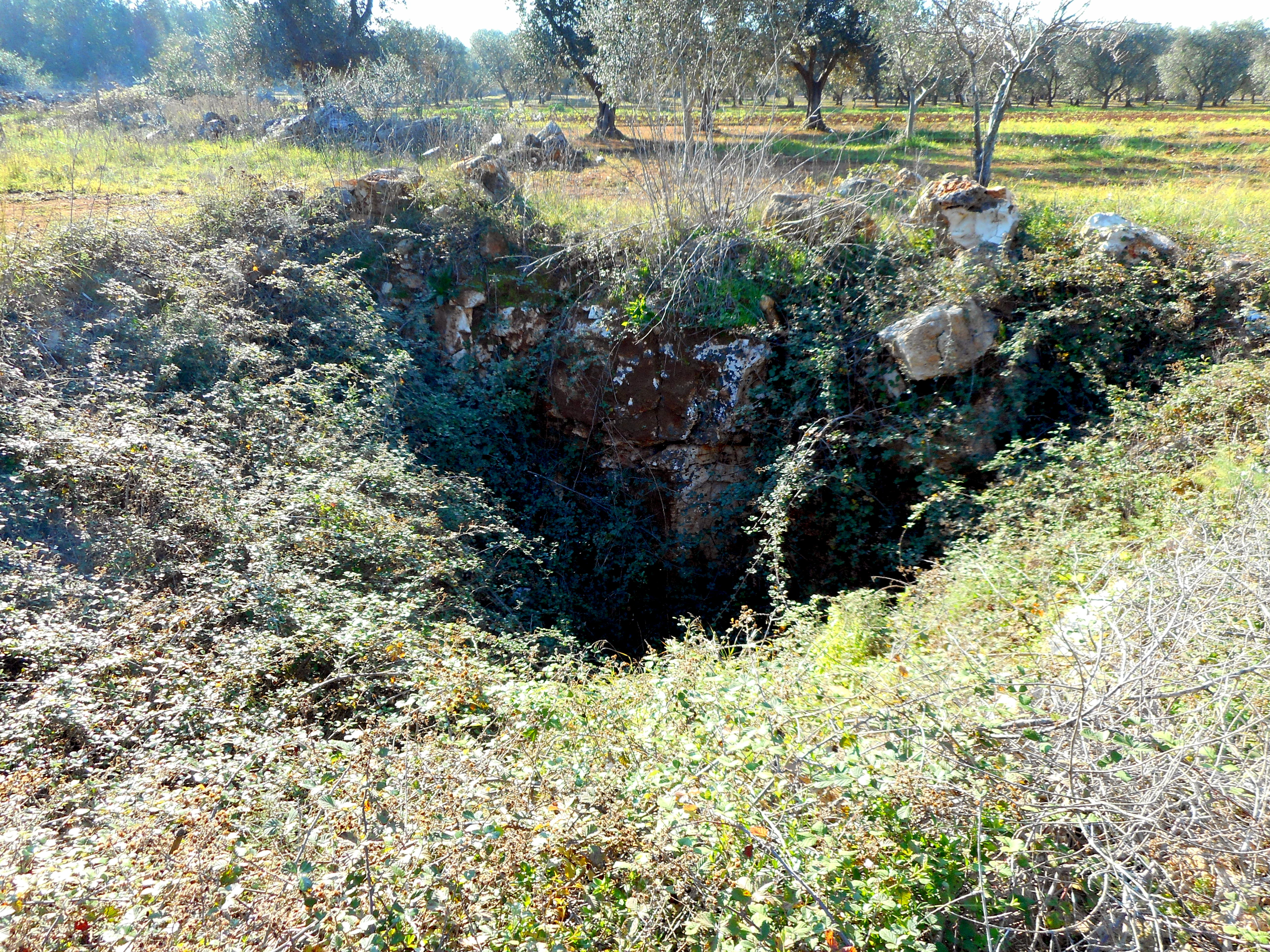 La cavità carsica della Ora a Maruggio